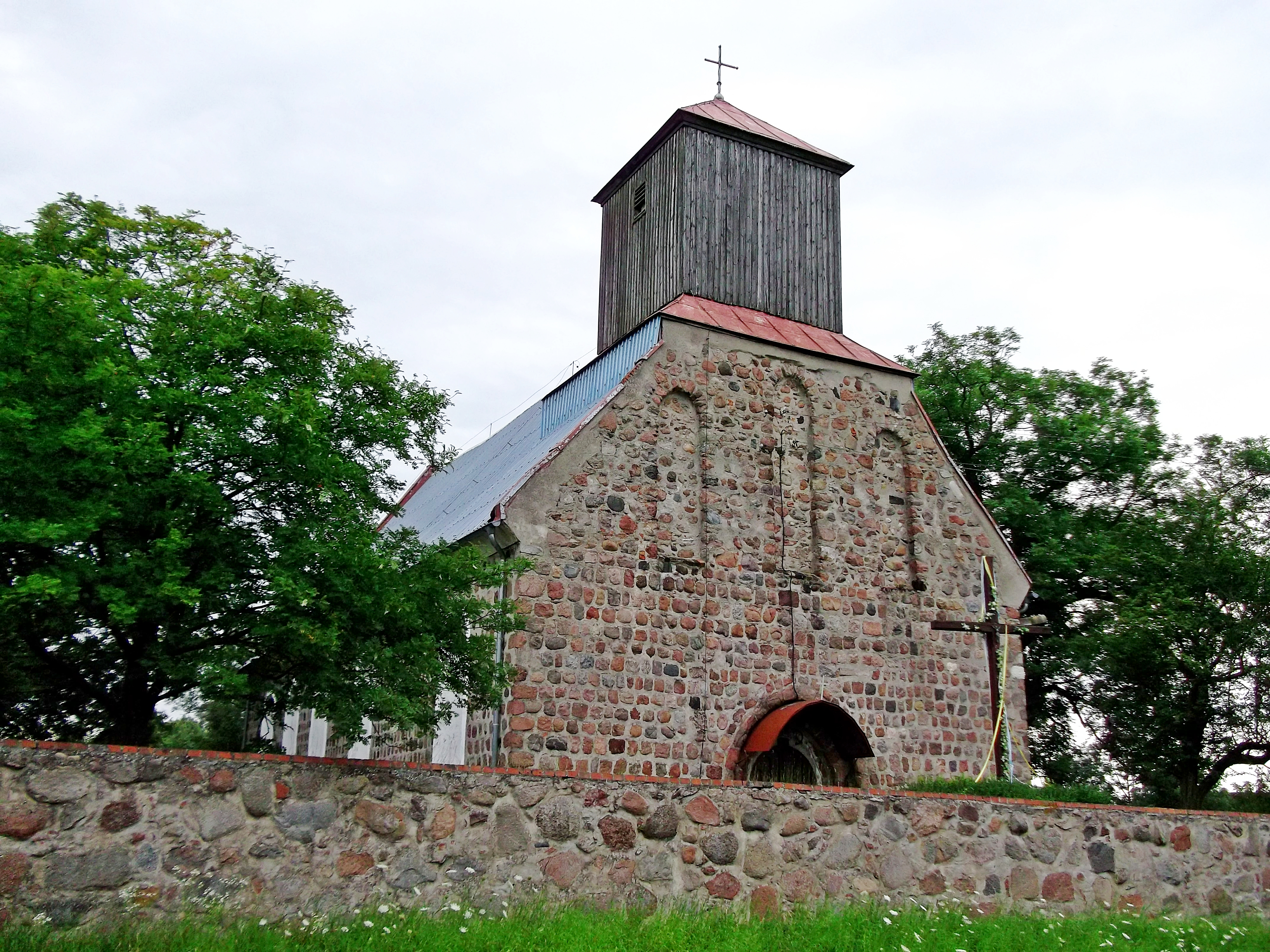 Lubanowo - kościół Chrystusa Króla